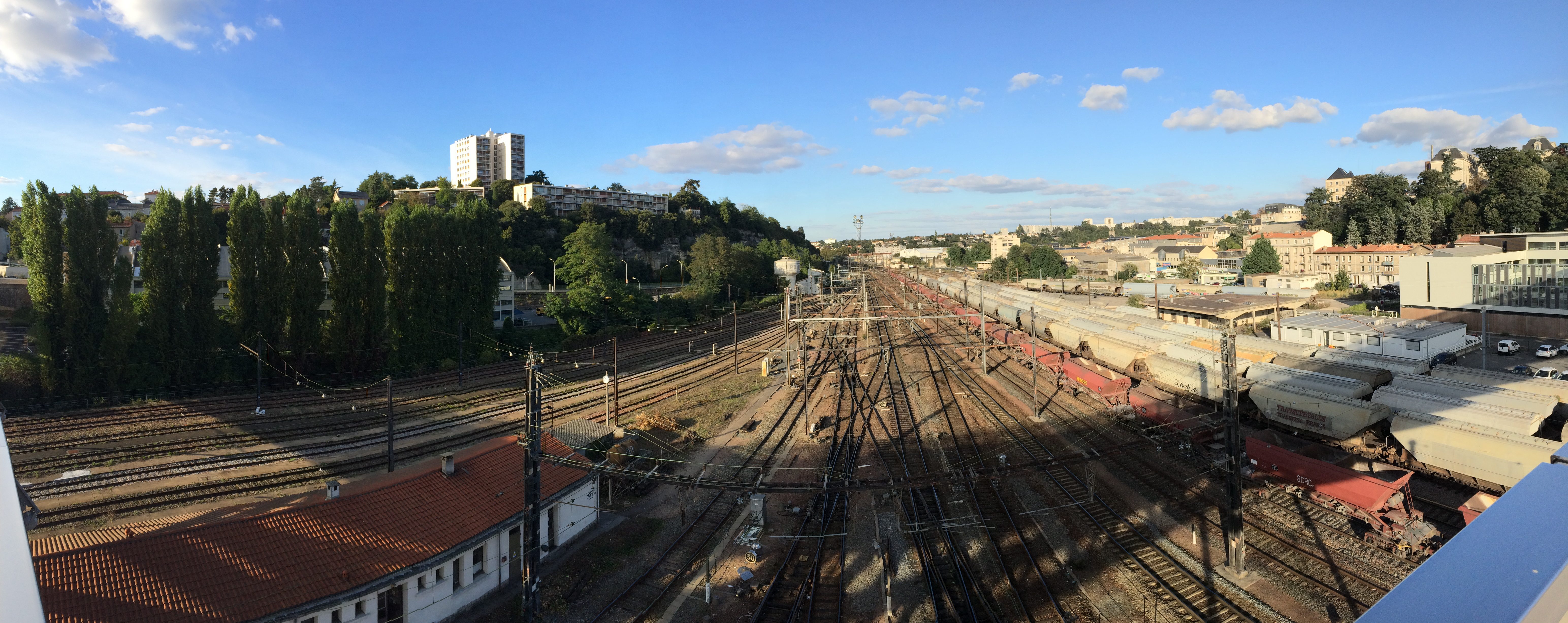 Vue panoramique de la gare SNCF de Poitiers depuis le Viaduc Léon Blum.